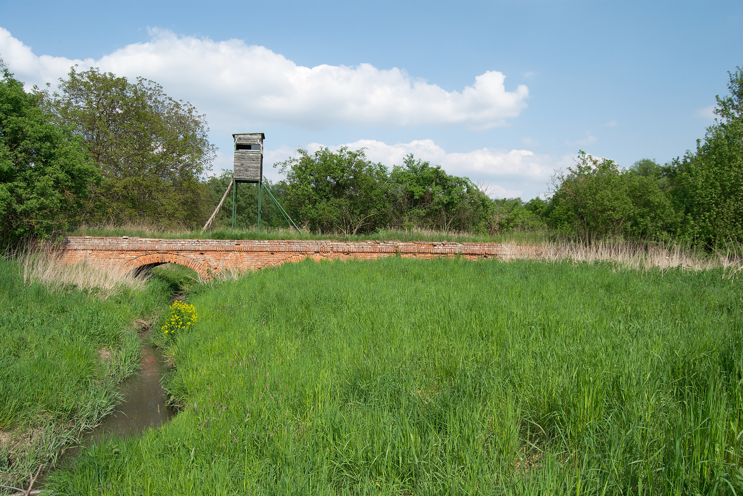 Cihlový most k Tichémuo strovu u Mikulova vyfotografovaný od jihu. Jedná se o památku ze 17. století